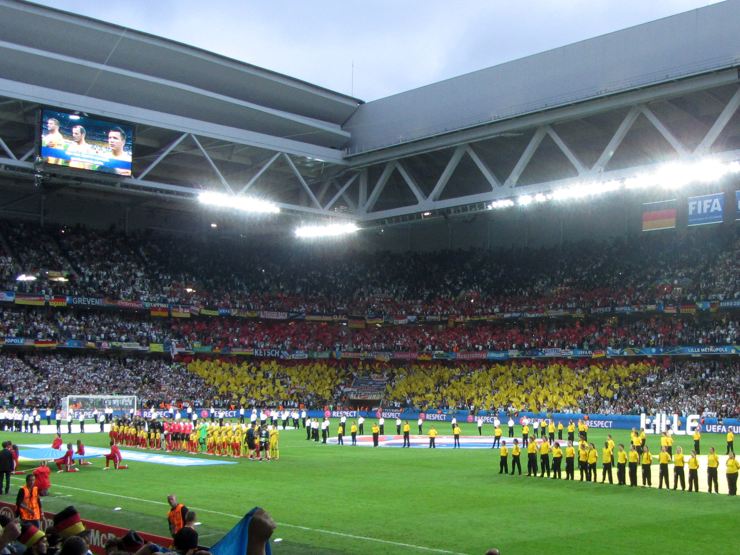 Deutschland - Ukraine 2:0 Euro 2016 Stade Pierre-Mauroy, Lille